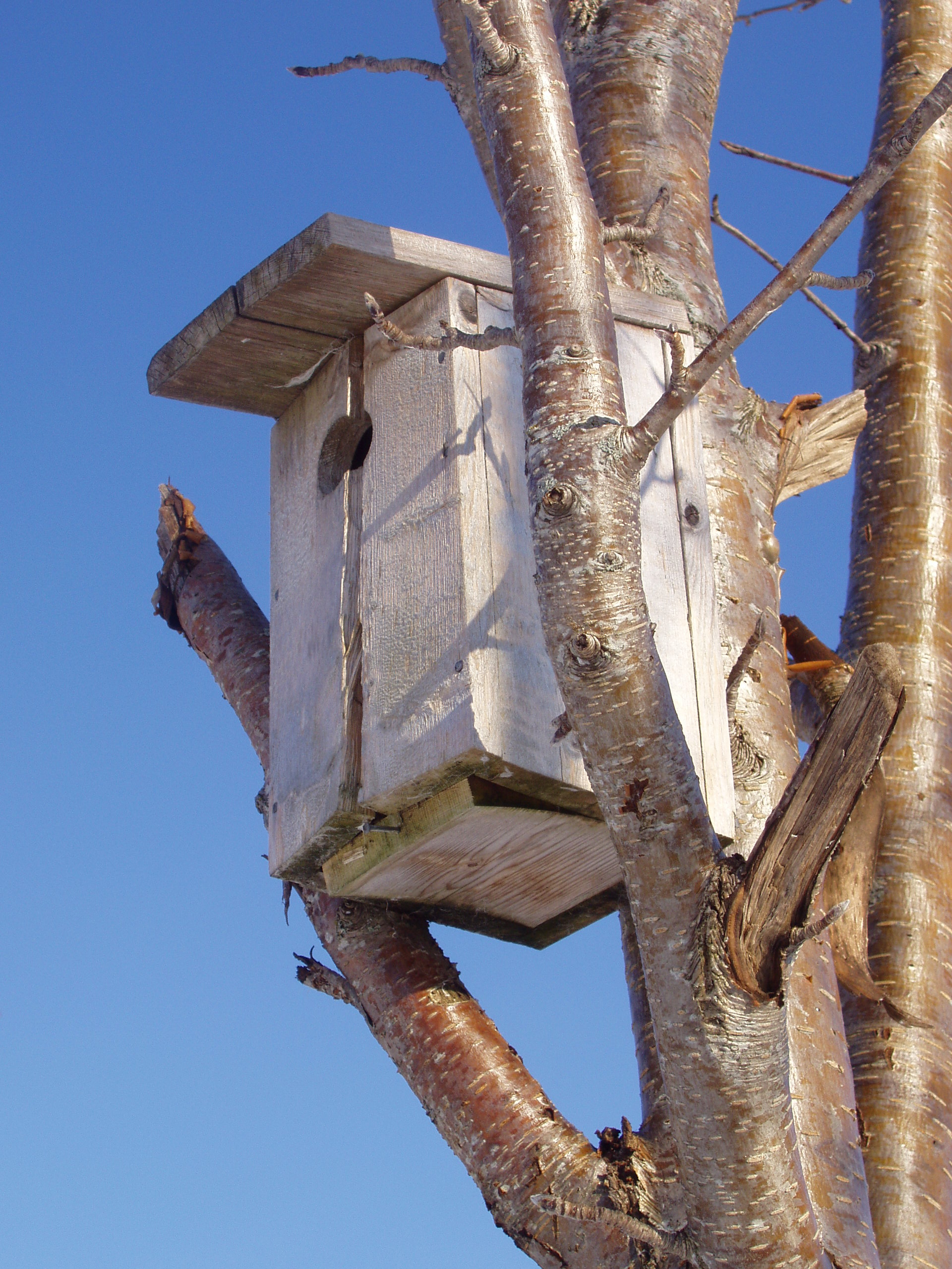 Fuglekasse (Birdhouse) in Sorbus aucuparia